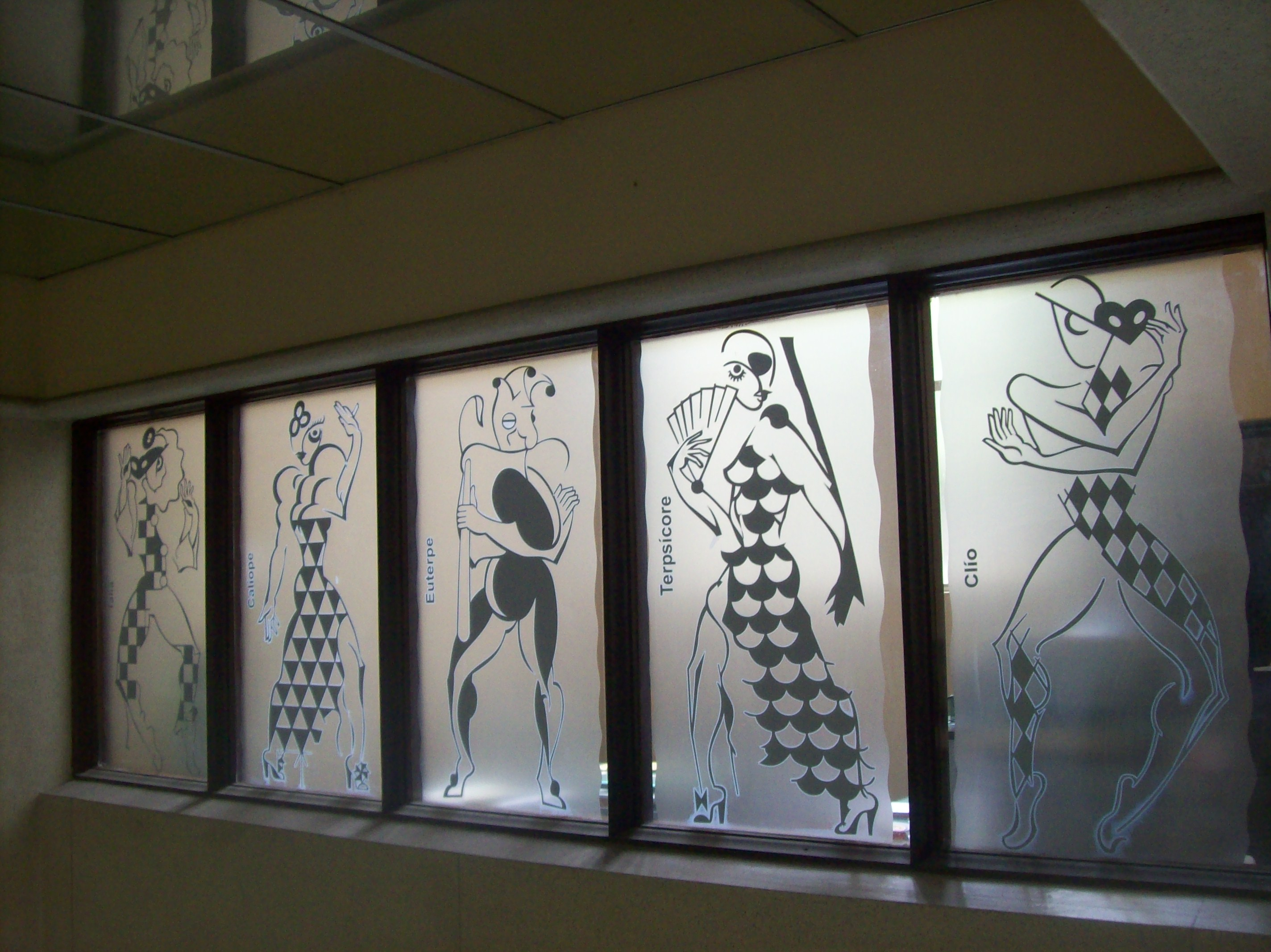 Interior del Teatro Lido.